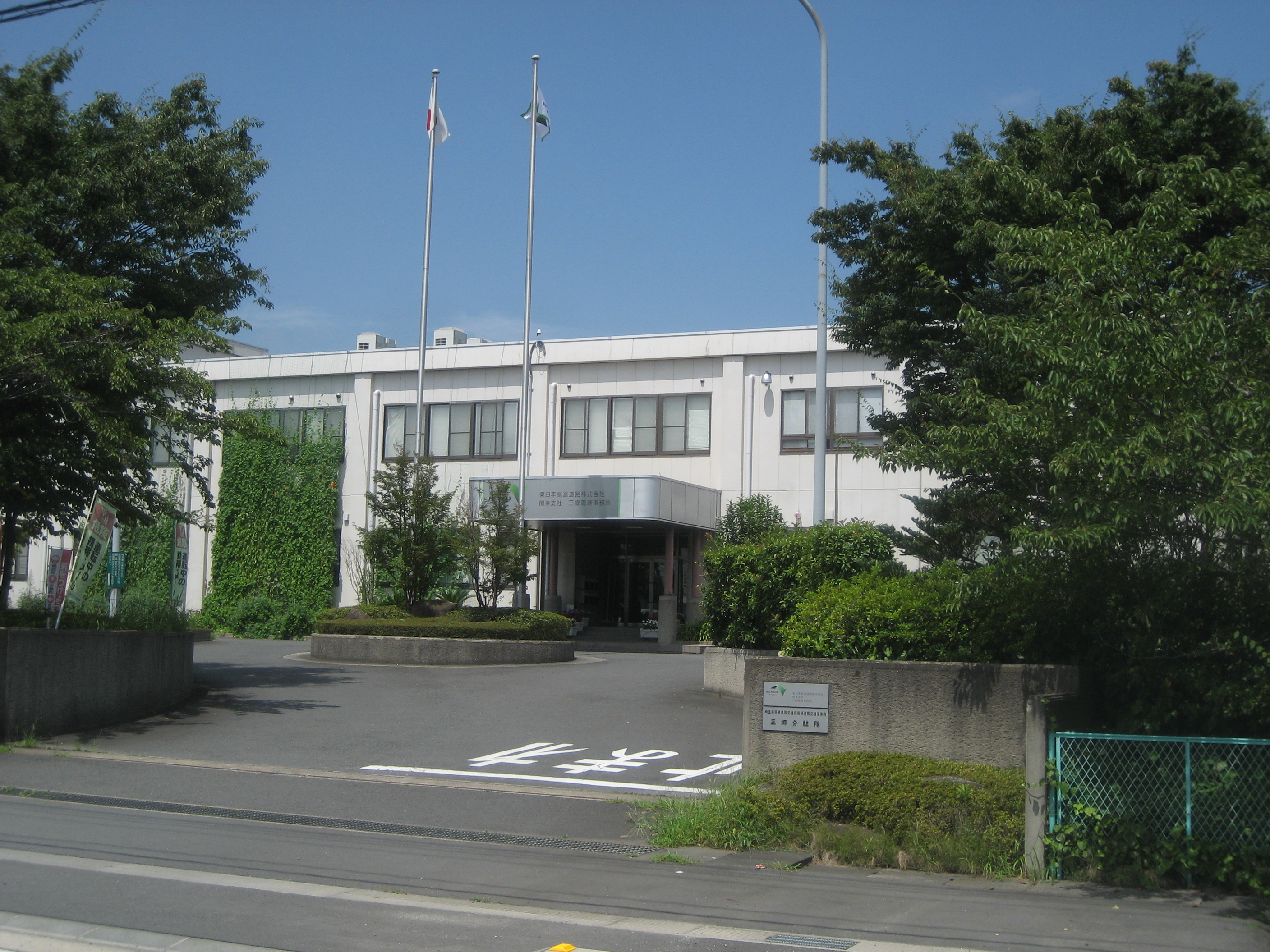 東日本高速道路三郷管理事務所、埼玉県警察高速道路交通警察隊三郷分駐隊